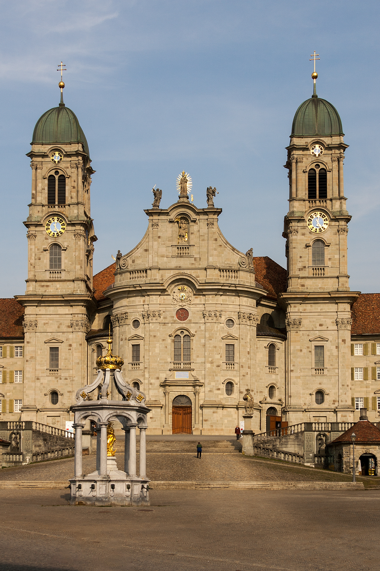 Klosterkirche in Einsiedeln (SZ)